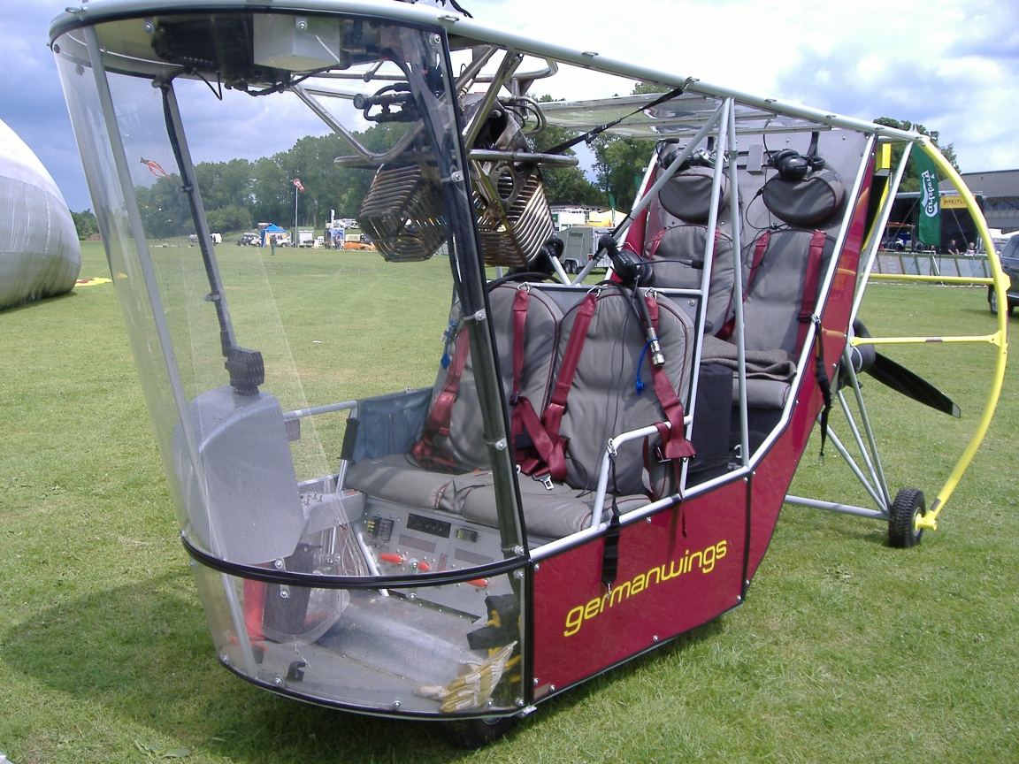 Gondel eines modernen Luftschiffes